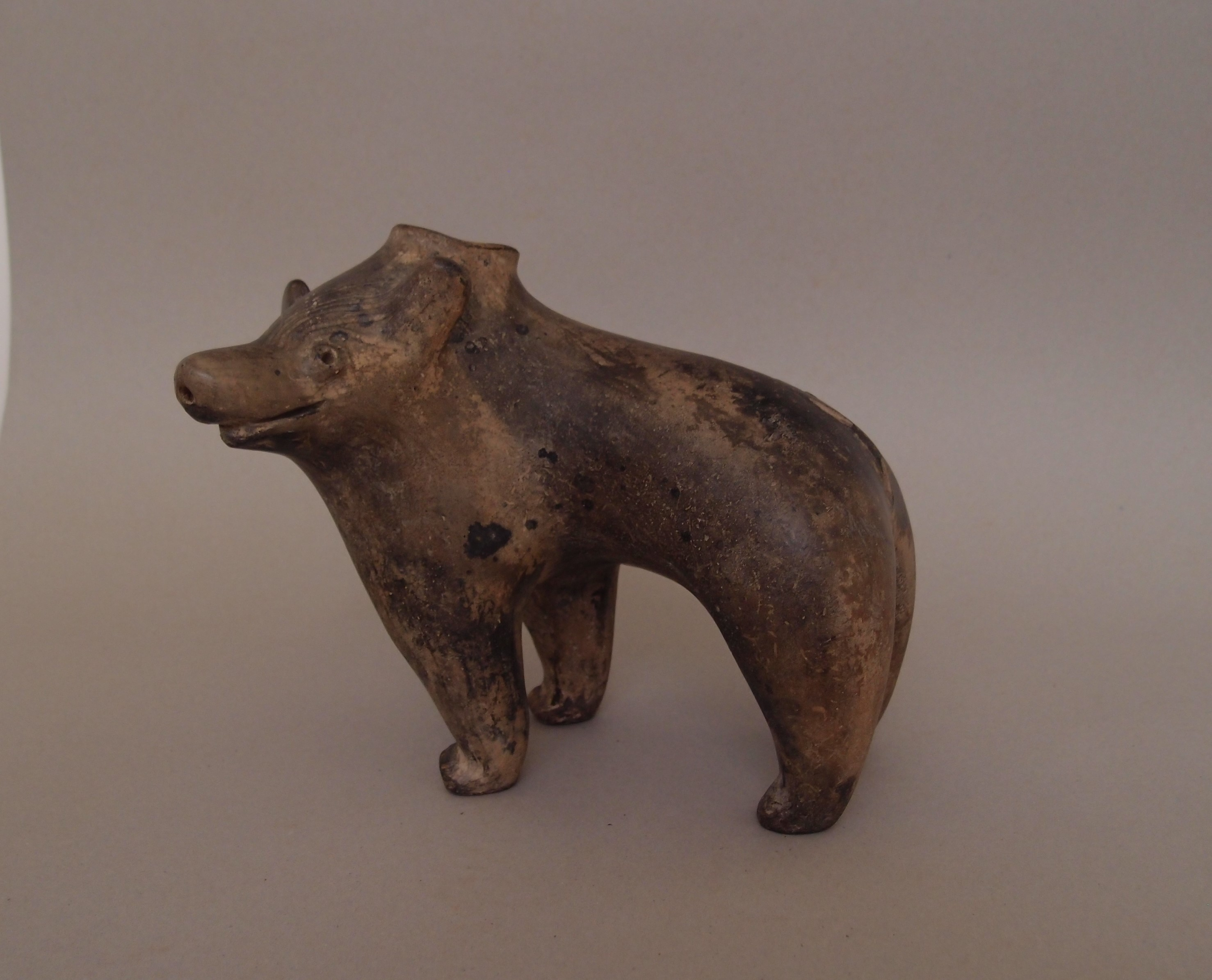 Արջակերպ ծիսանոթ. թանգարանի այցեքարտերից մեկը